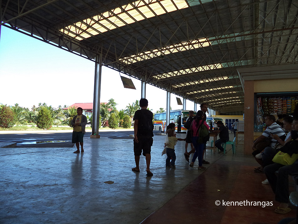 Kabacan Terminal